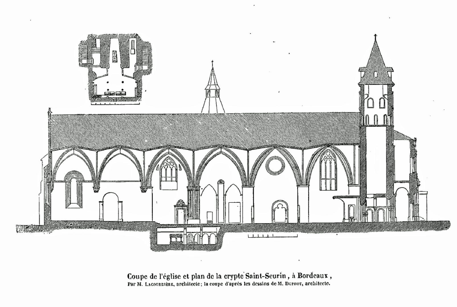 Basilique Saint-Seurin Coupe (Lacourrière 1850)